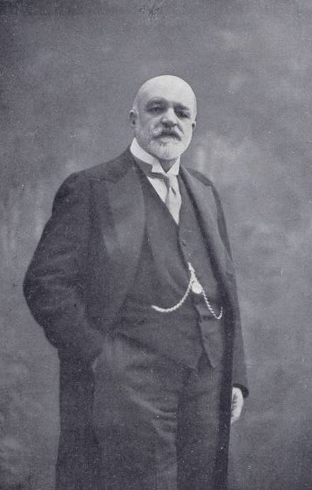 Ritratto fotografico del Conte Emanuele Greppi